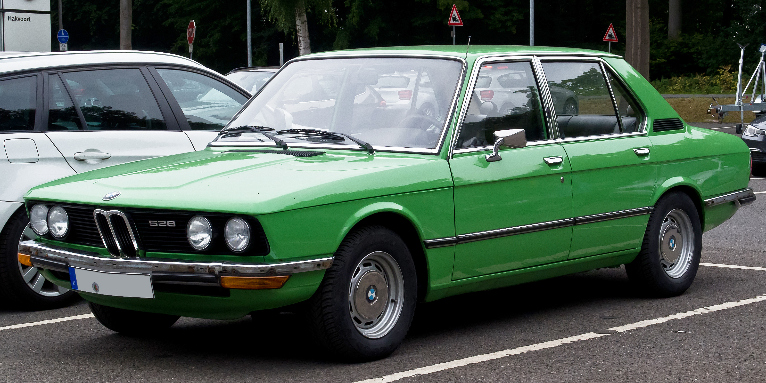 BMW 528 (E12)